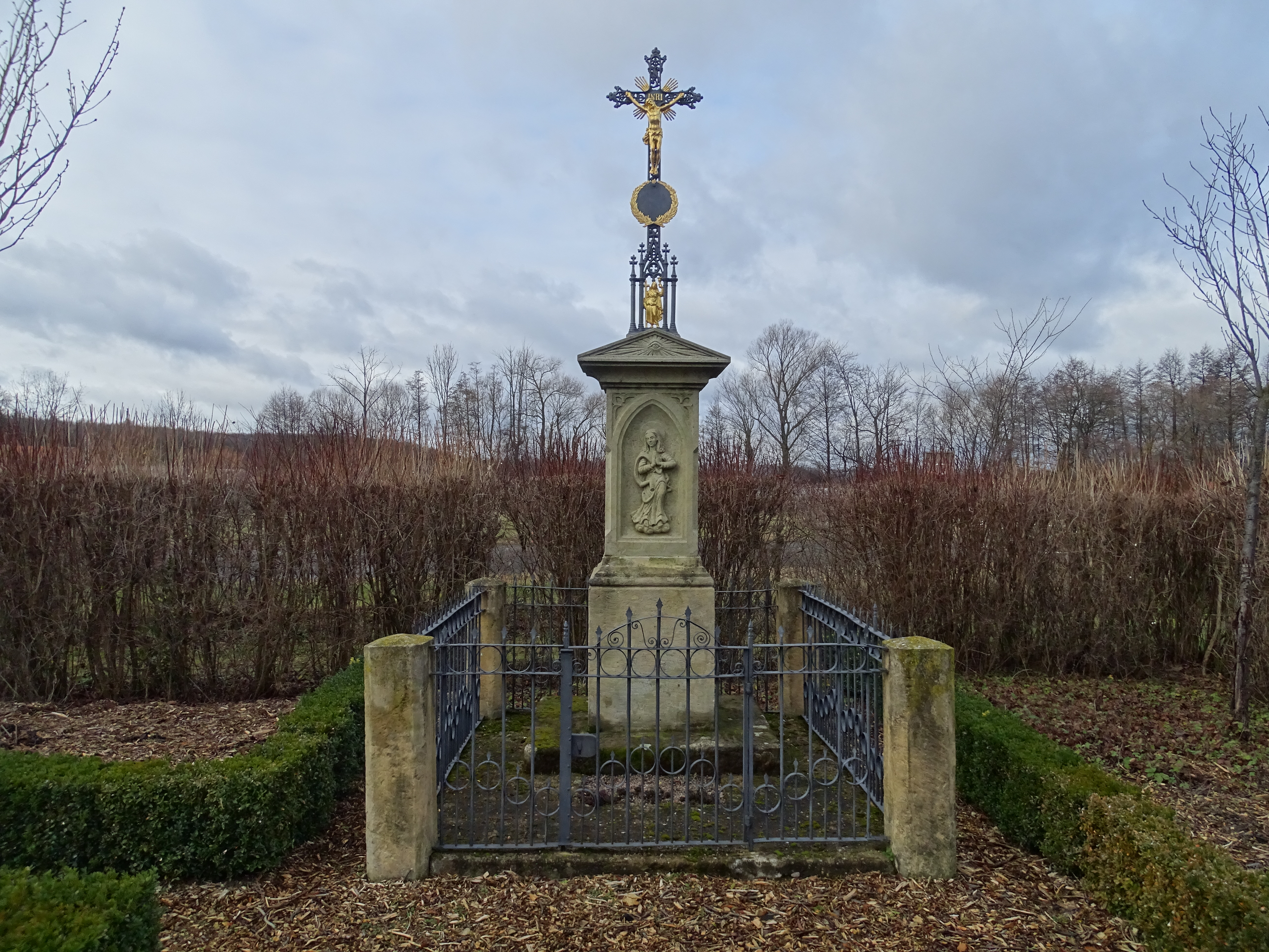 Netřeby